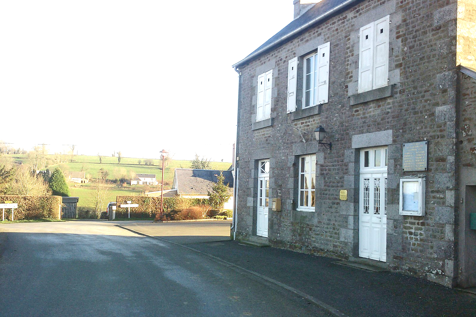 Morigny